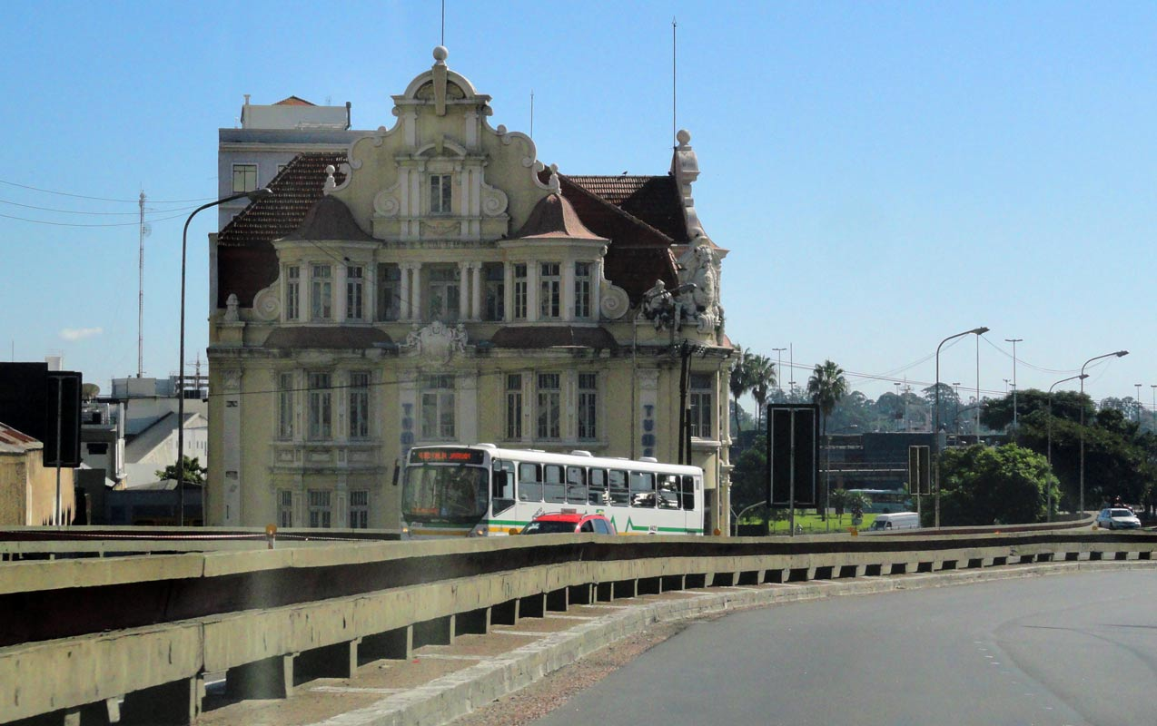 Edifício Ely cortado pelo Viaduto da Conceição